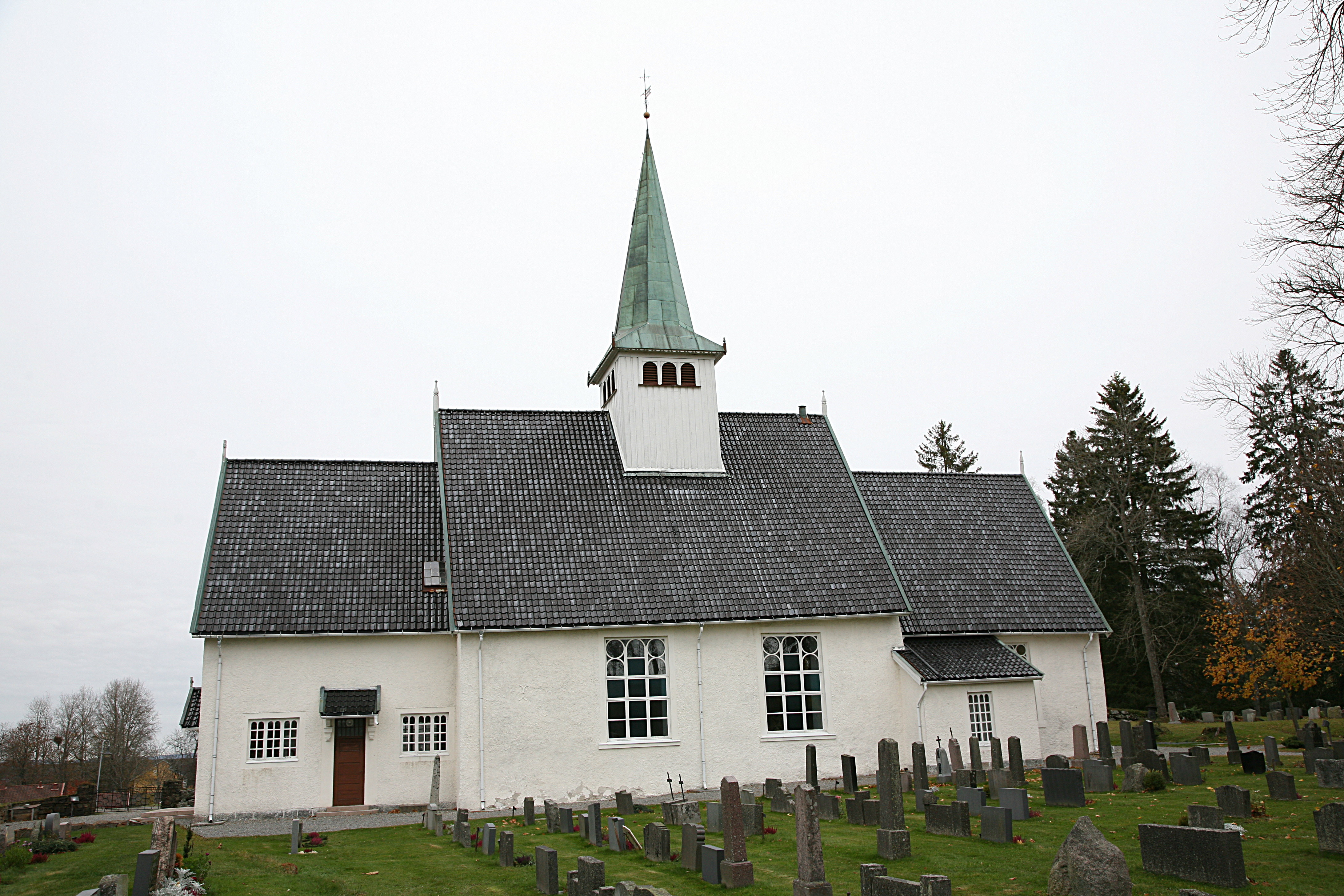 Trøgstad kirke. Church in Trøgstad, Østfold, Norway.